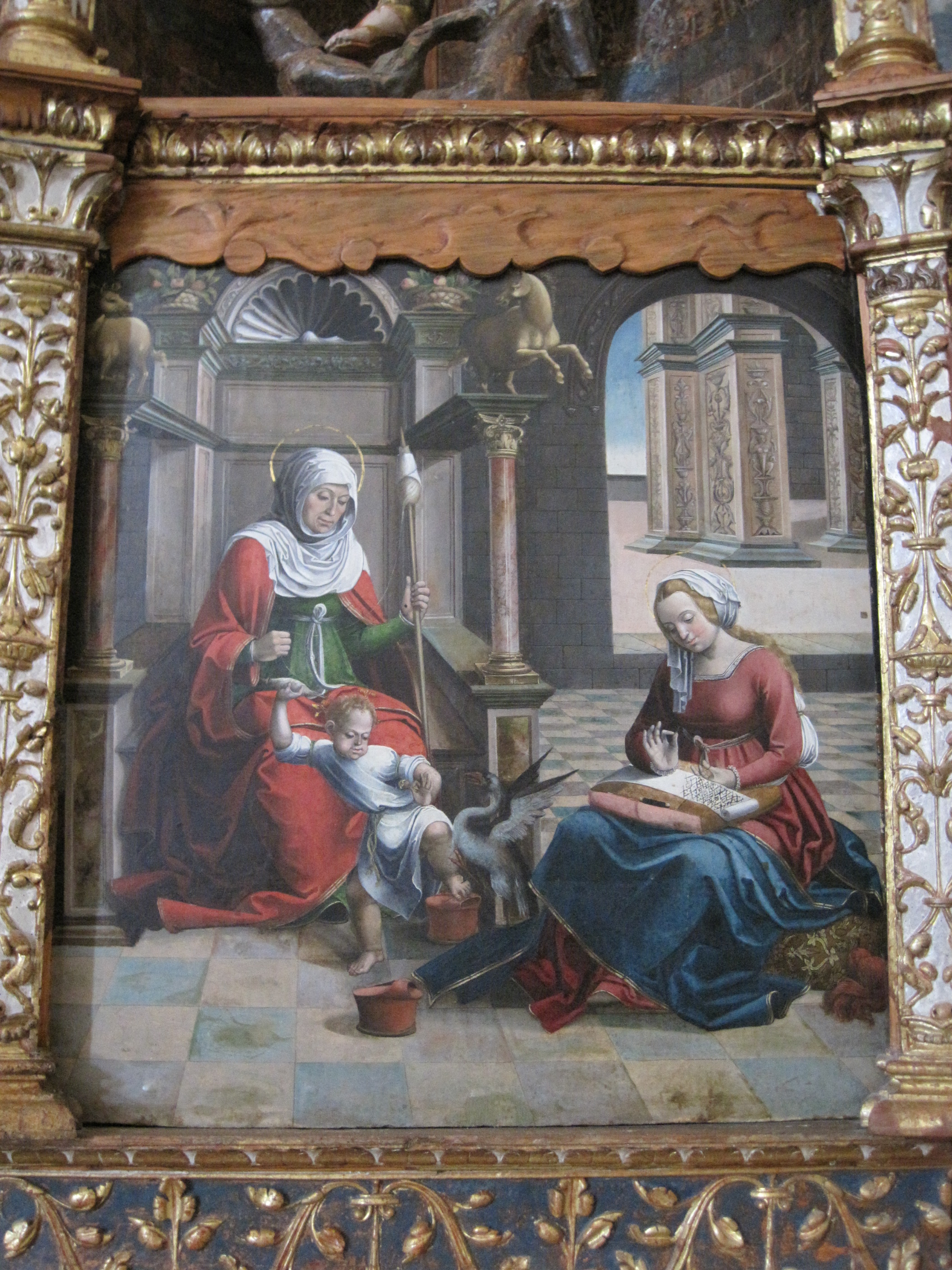 Detalle del retablo de San Miguel, en la iglesia de Ventosa de la Cuesta (Valladolid, España).